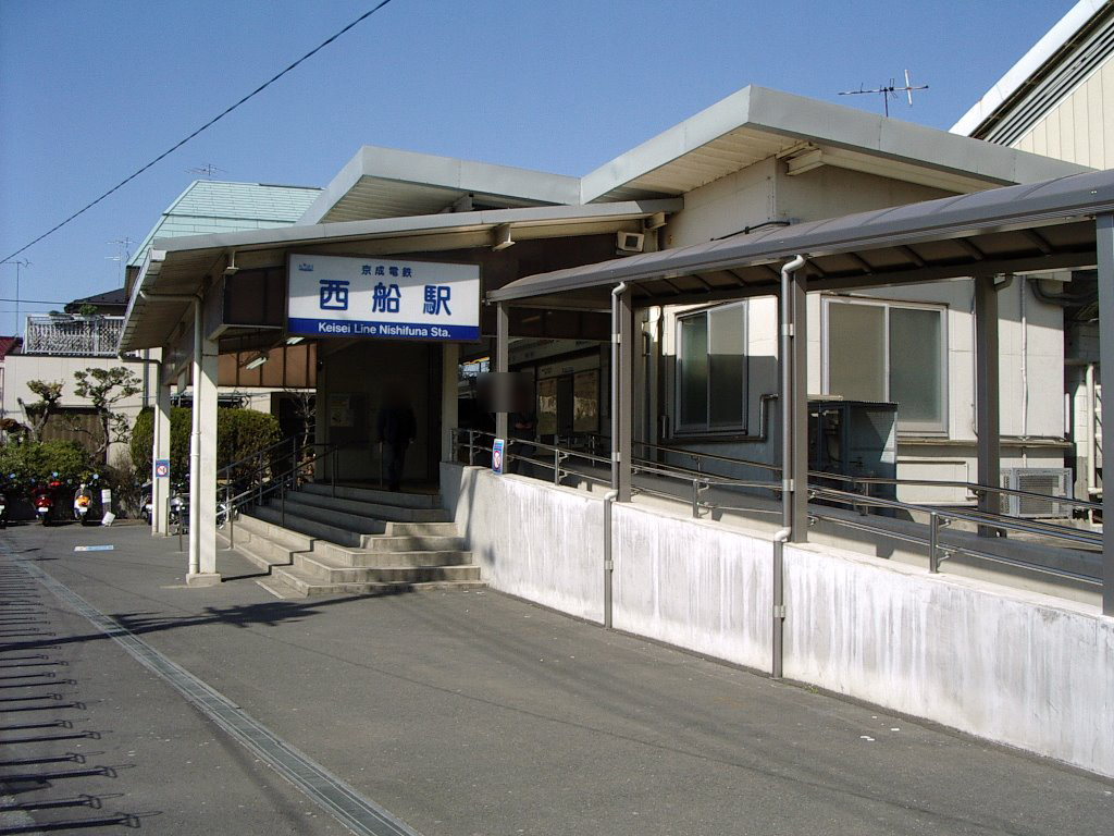 京成電鉄本線京成西船駅